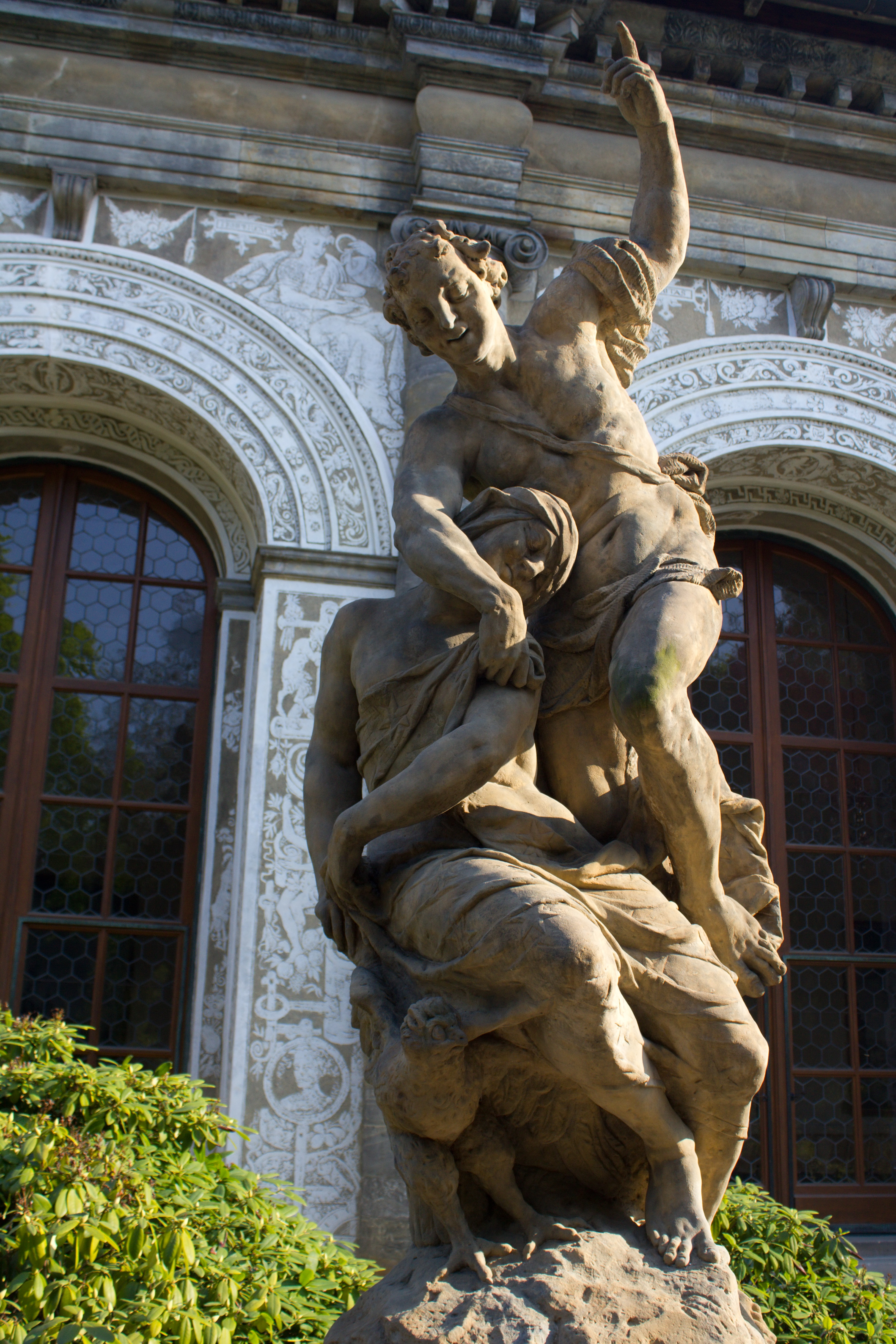 Alegorie noci, dílna Matyáše Bernarda Brauna, 1733(?34)